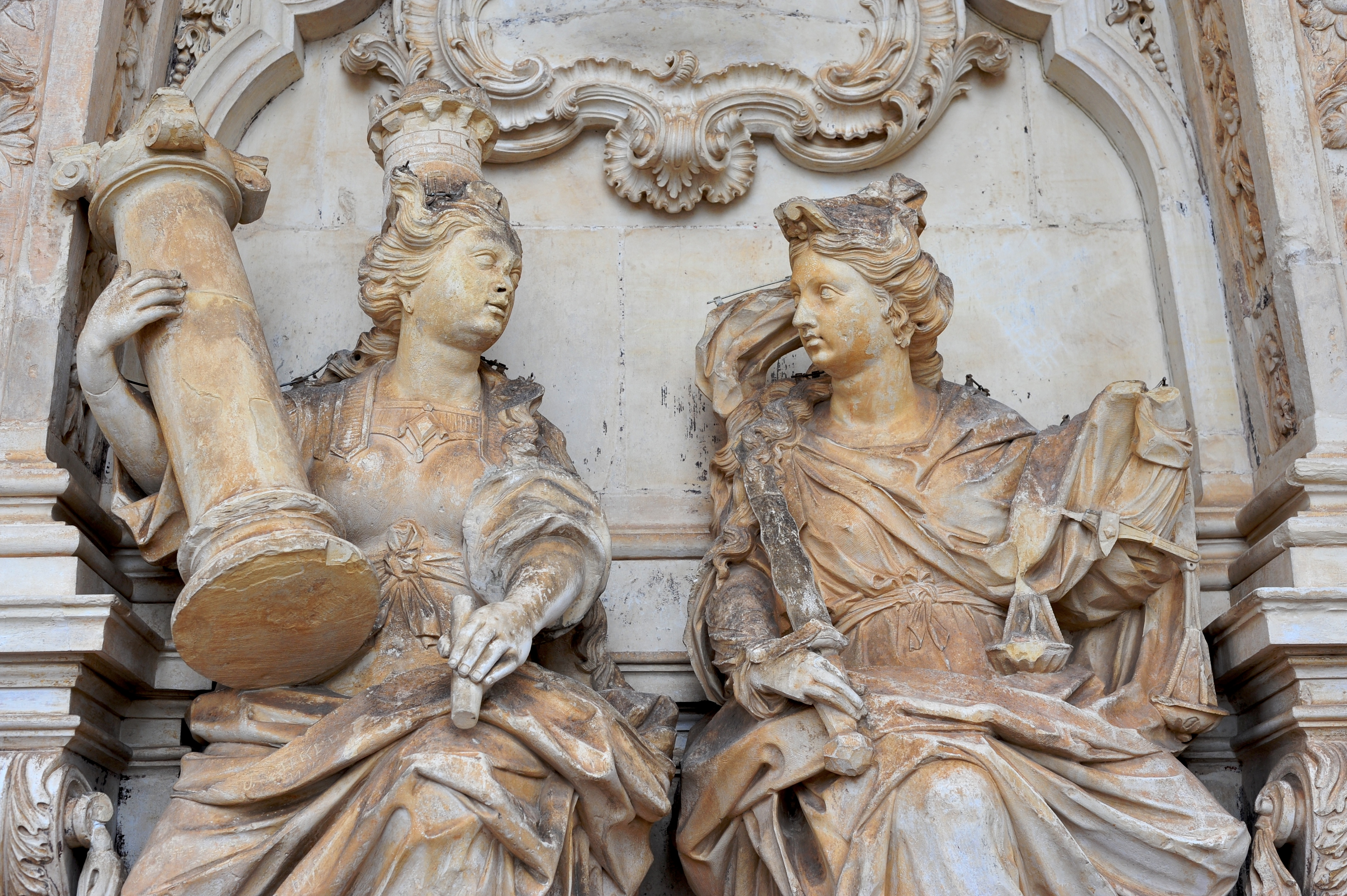 Allegorical figures at Coimbra University